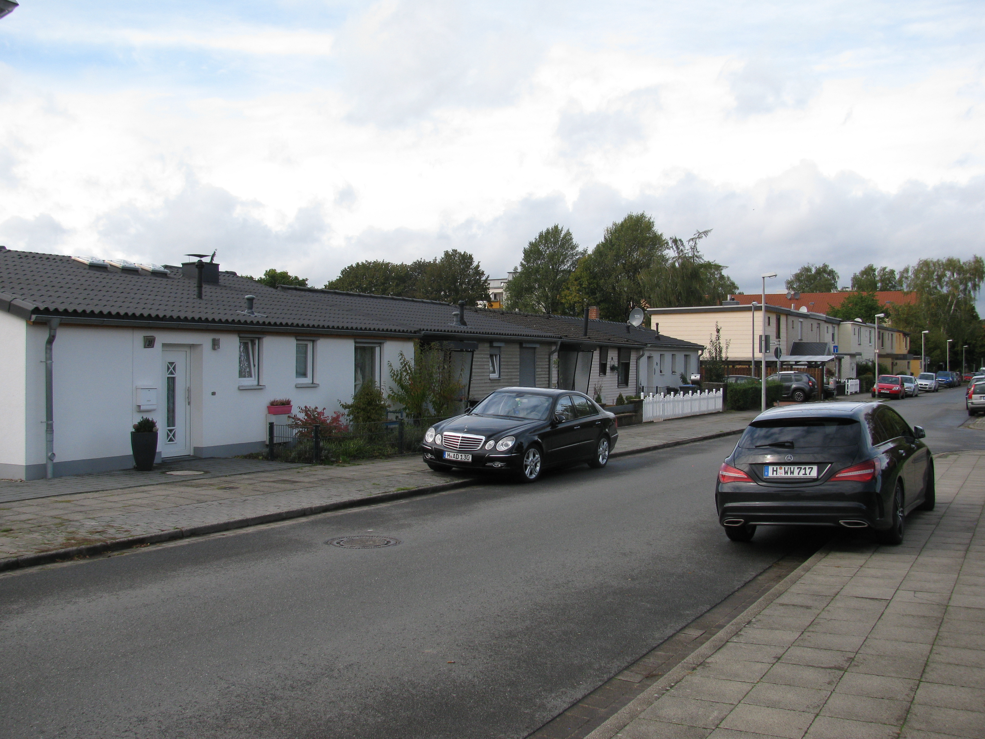 Häuser an der Thaerstraße in Hannover